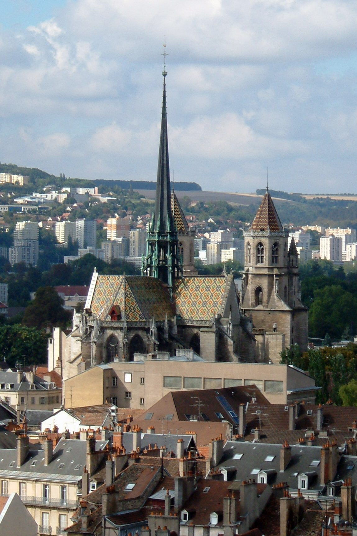 Cathédrale Saint-Bénigne. Vue du haut de la tour Philippe le Bon, Dijon, Bourgogne, FRANCE.